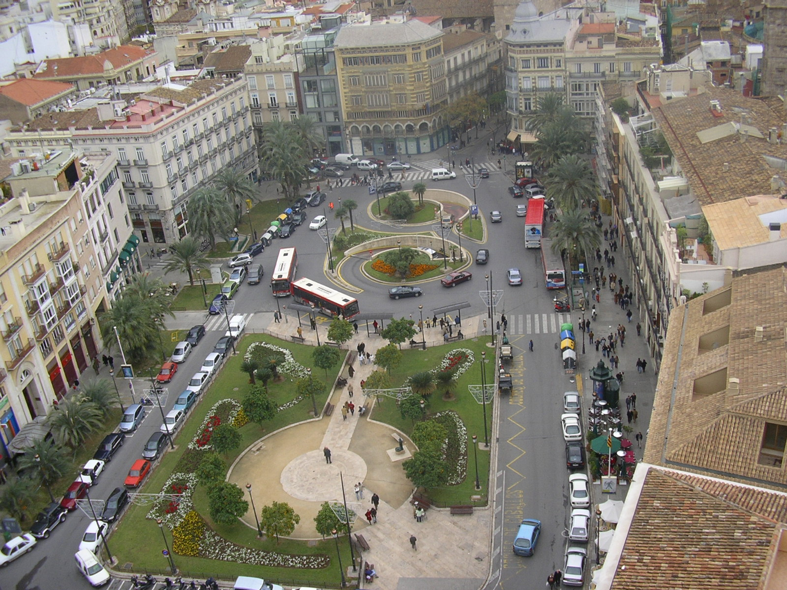 Plaza de la Reina, Valencia, España.